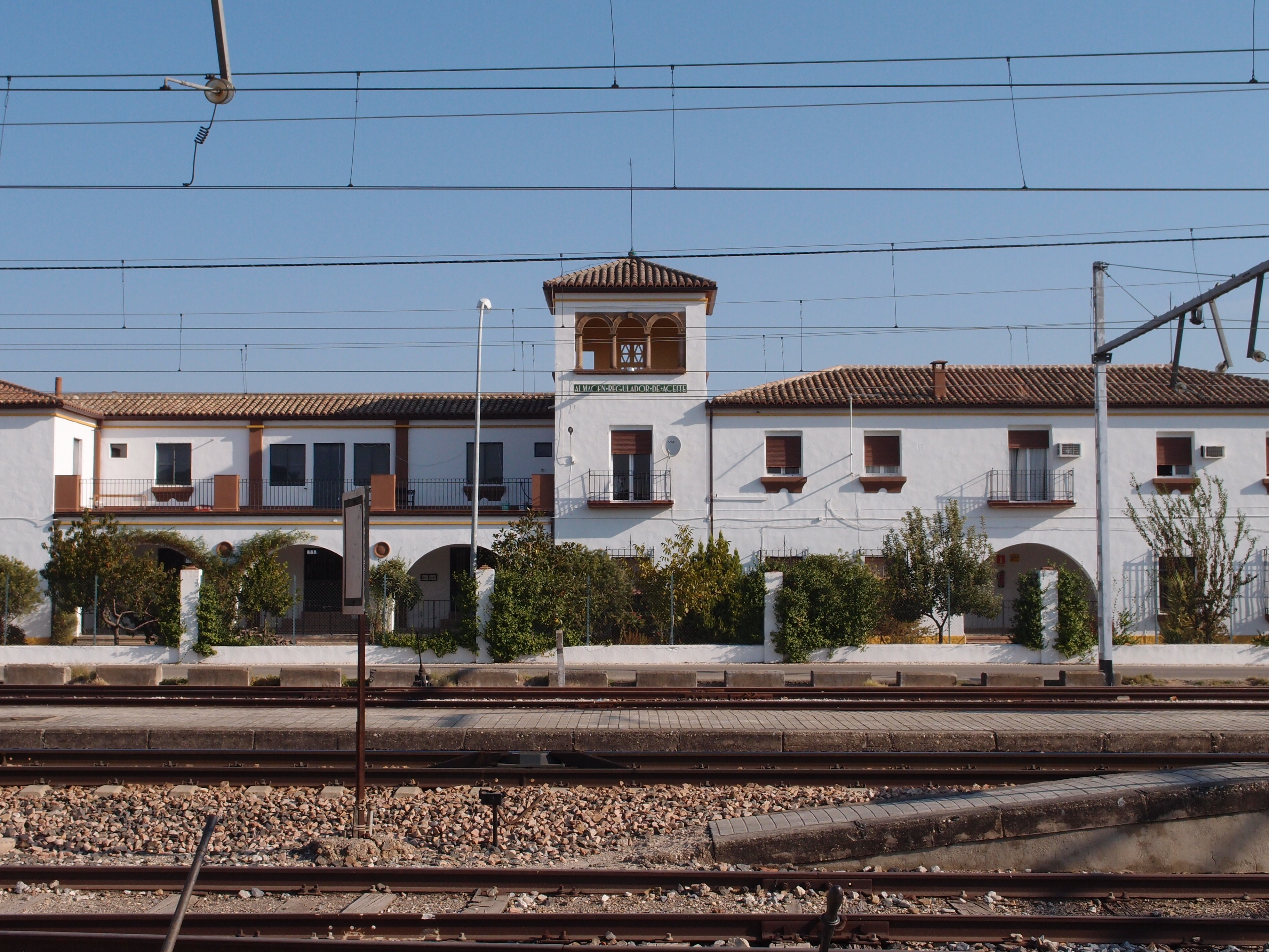 Vista de algunos edificios del almacén regulador, Estación de Espelúy (provincia de Jaén).